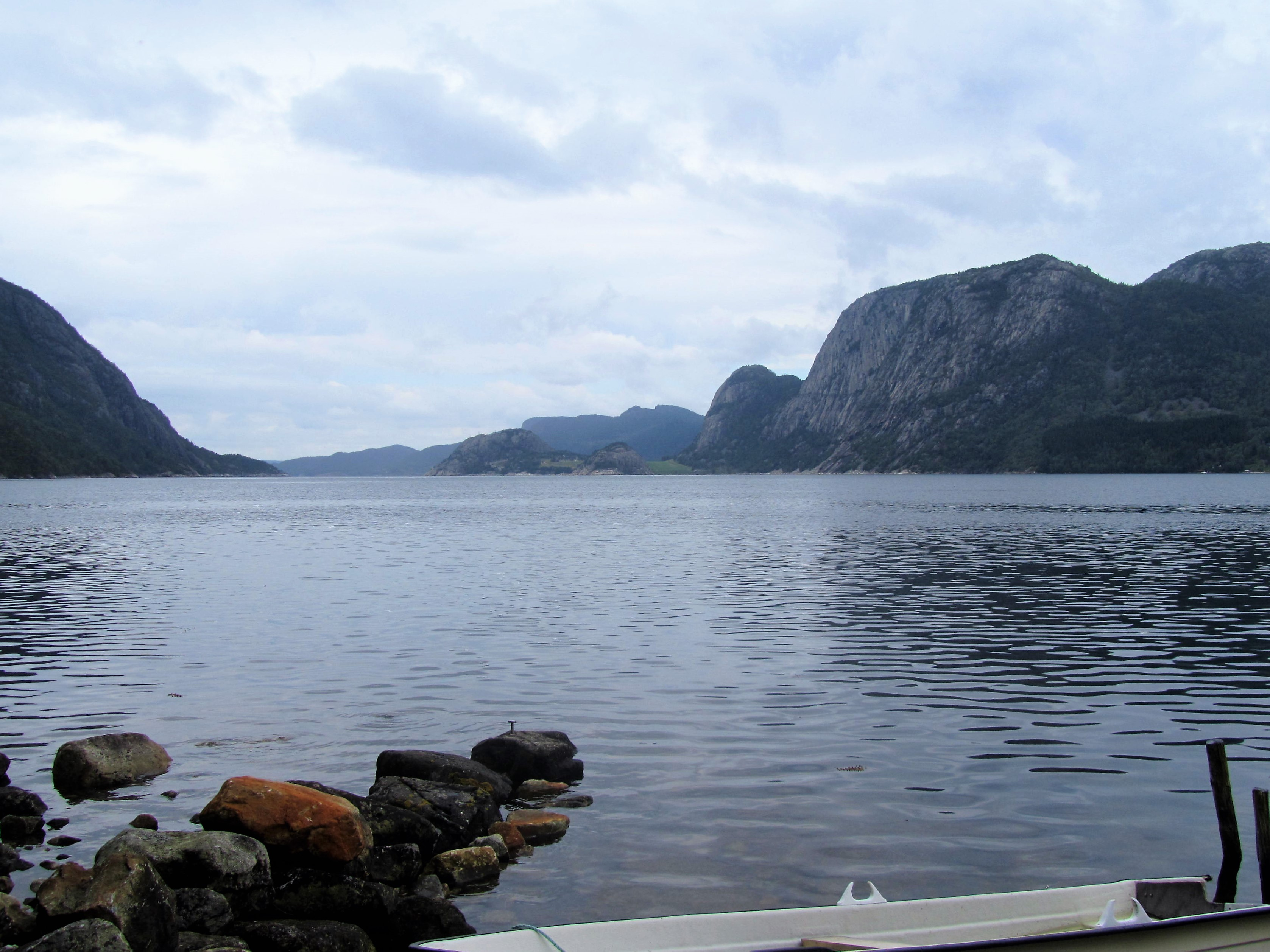 Årdalsfjorden i Rogaland fylke Norge, set mod vest